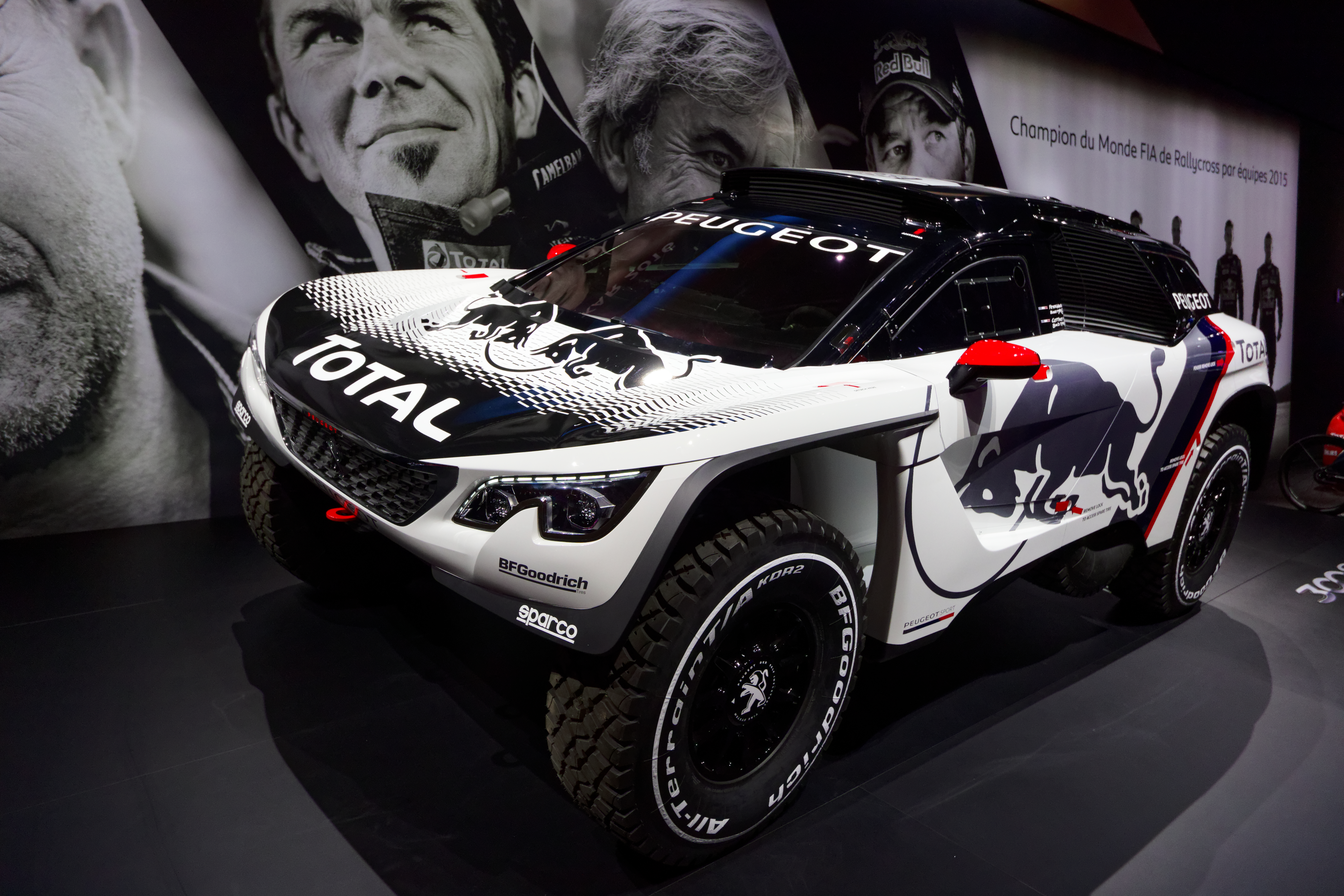 Une Peugeot 3008 DKR présentée lors du mondial de l'automobile de Paris 2016.